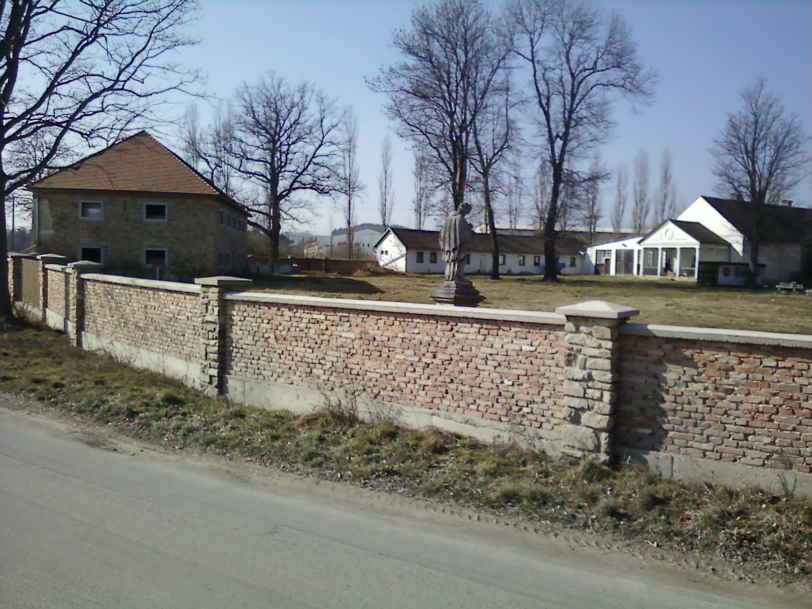 místo zbořeného zámku v Plandrech